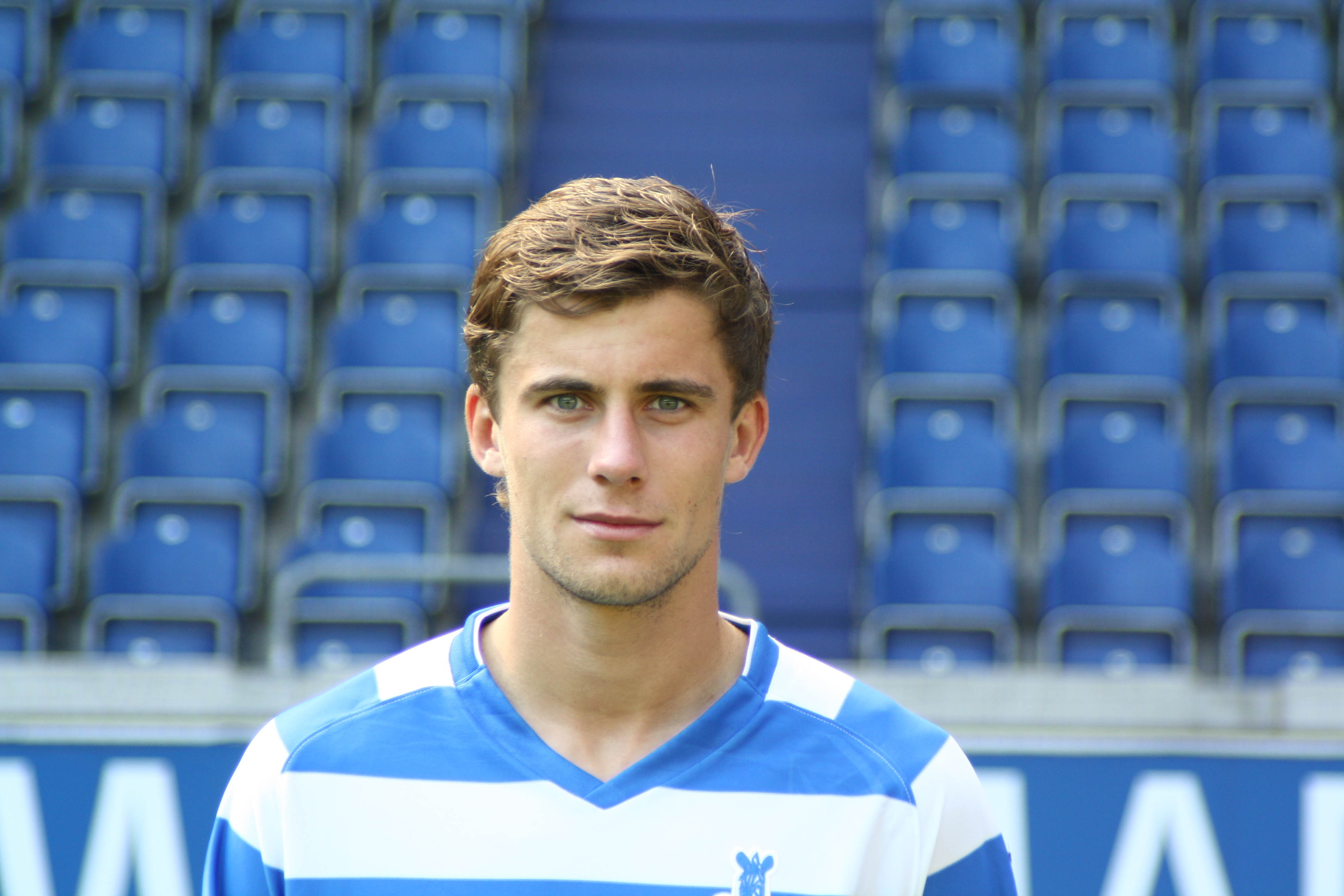 Daniel Reiche, MSV Duisburg